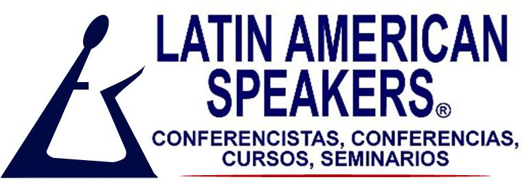 Logotipo actual de Latin American Speakers